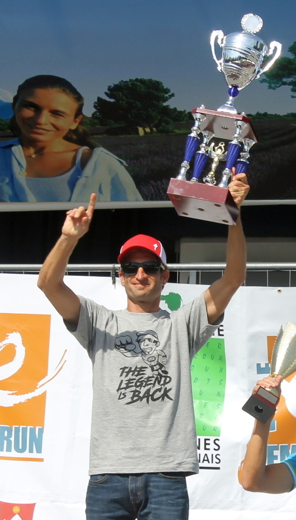 Podium homme Embrunman 2017